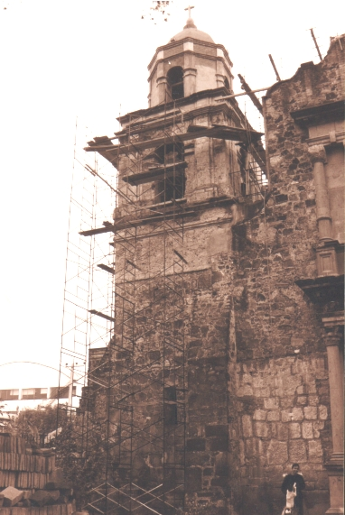 Parroquia de San Lucas Evangelista, patrono de Iztapalapa de Cuitláhuac (México), durante las obras de "restauración" de su portada.